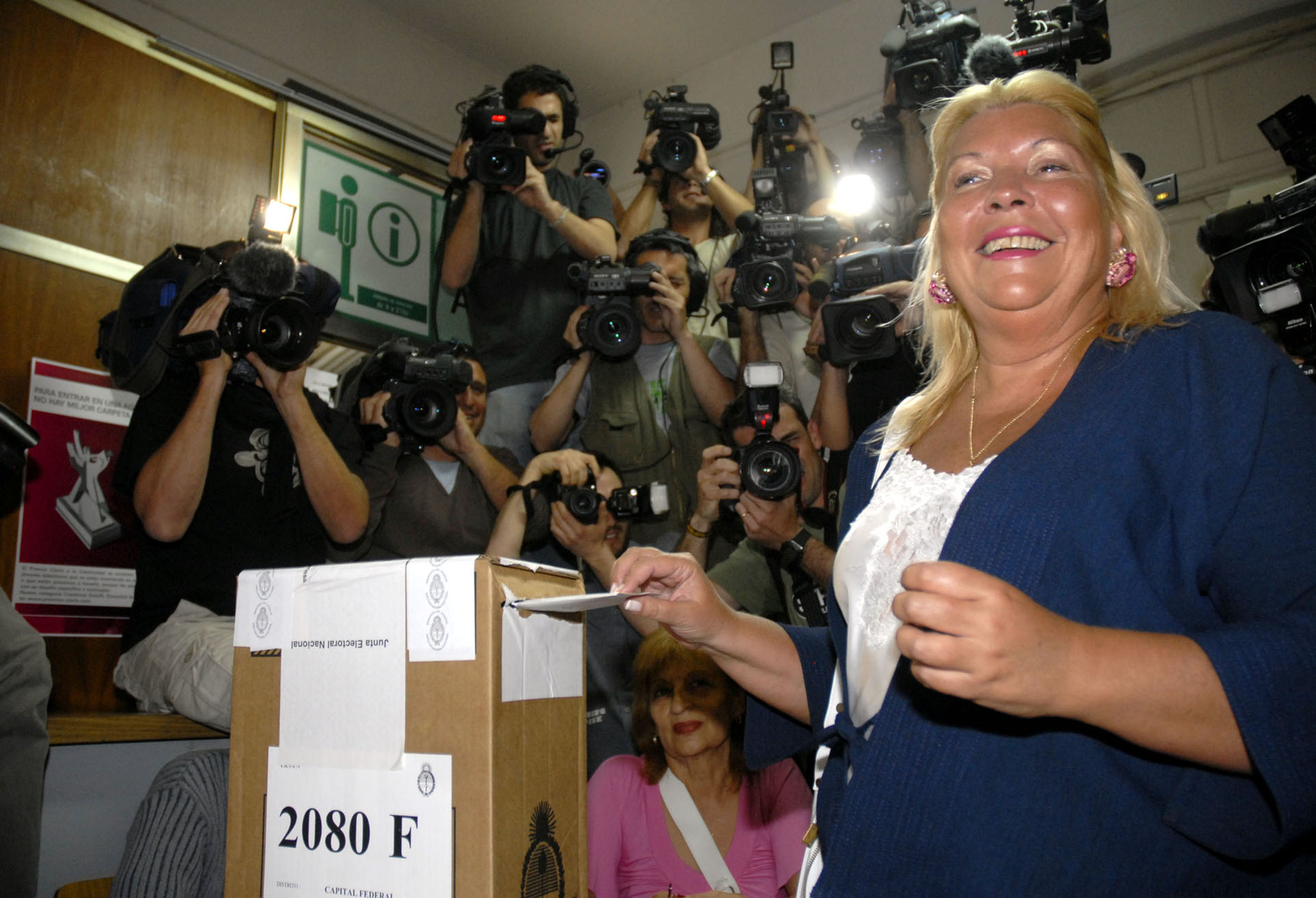 A candidata à Presidência Elisa Carrió vota em bairro próximo ao centro da cidade.